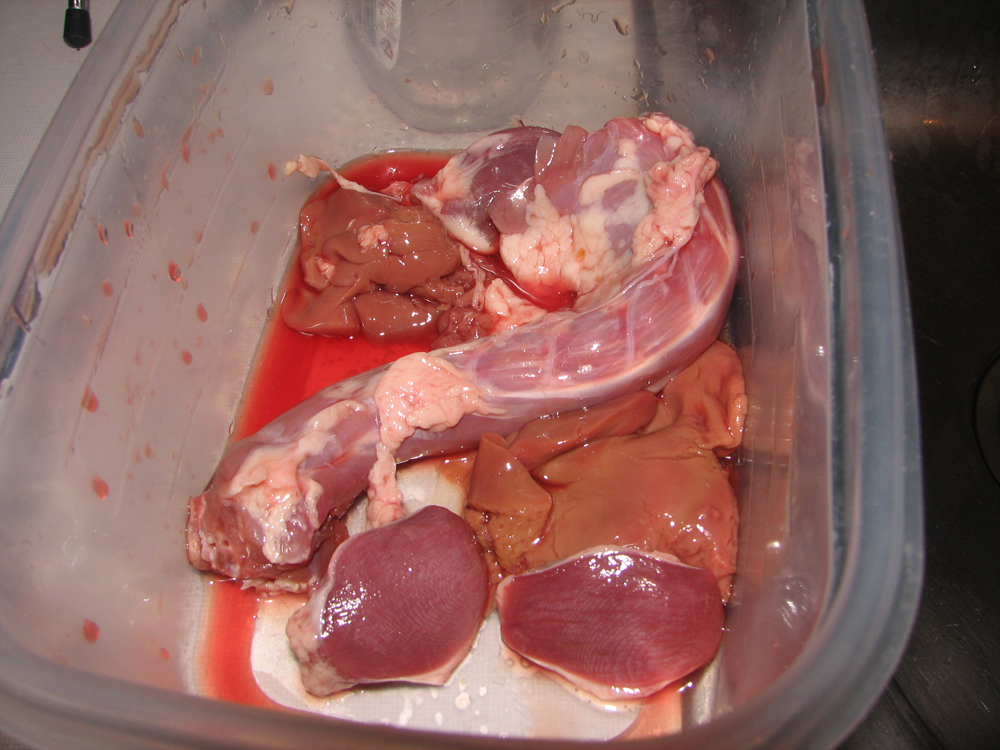 giblets